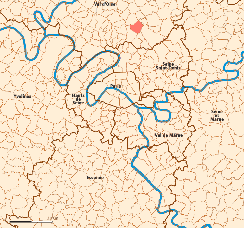 Villiers-le-Bel